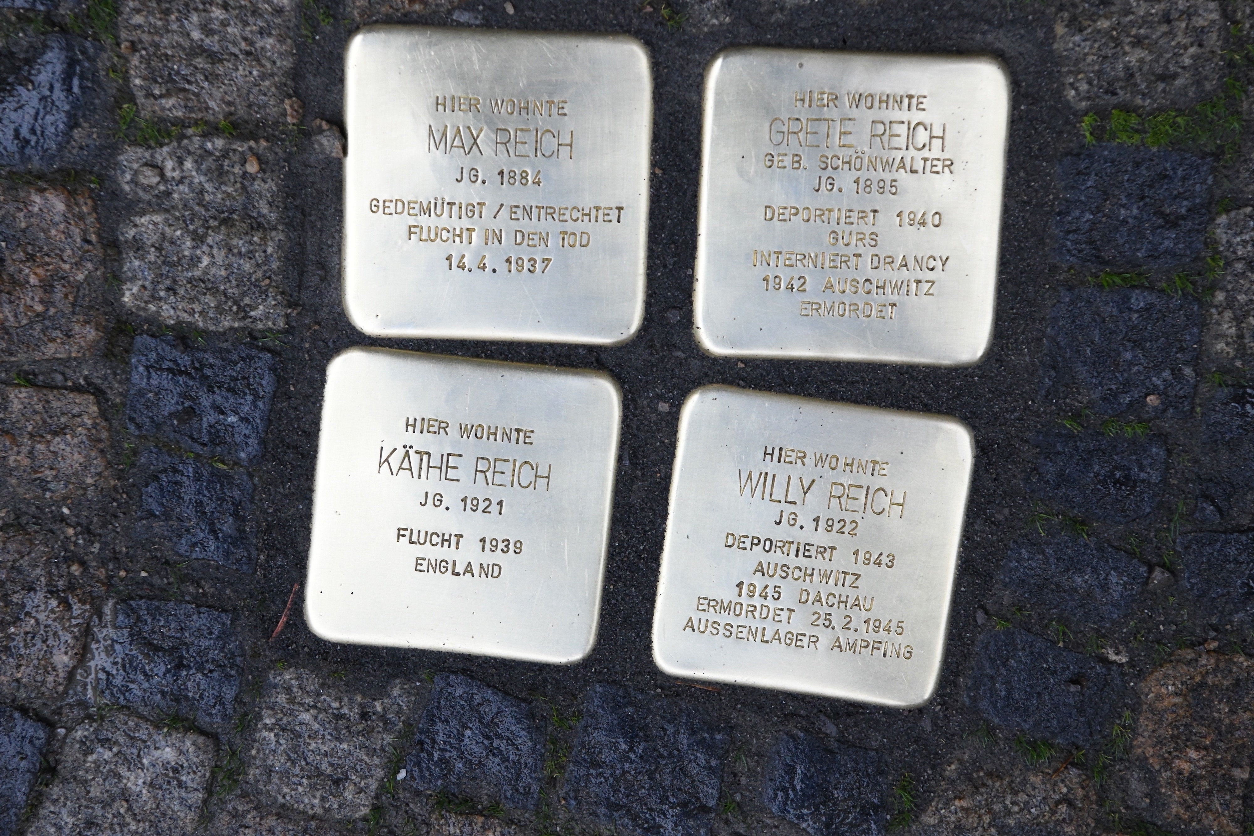 Stolpersteine, Familie Reich, Verlegungsort unklar, Prichsenstadt